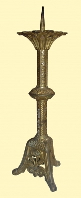 Pique-cierge français d'inspiration médiévale, en bronze, datant probablement de la fin XIXème siècle